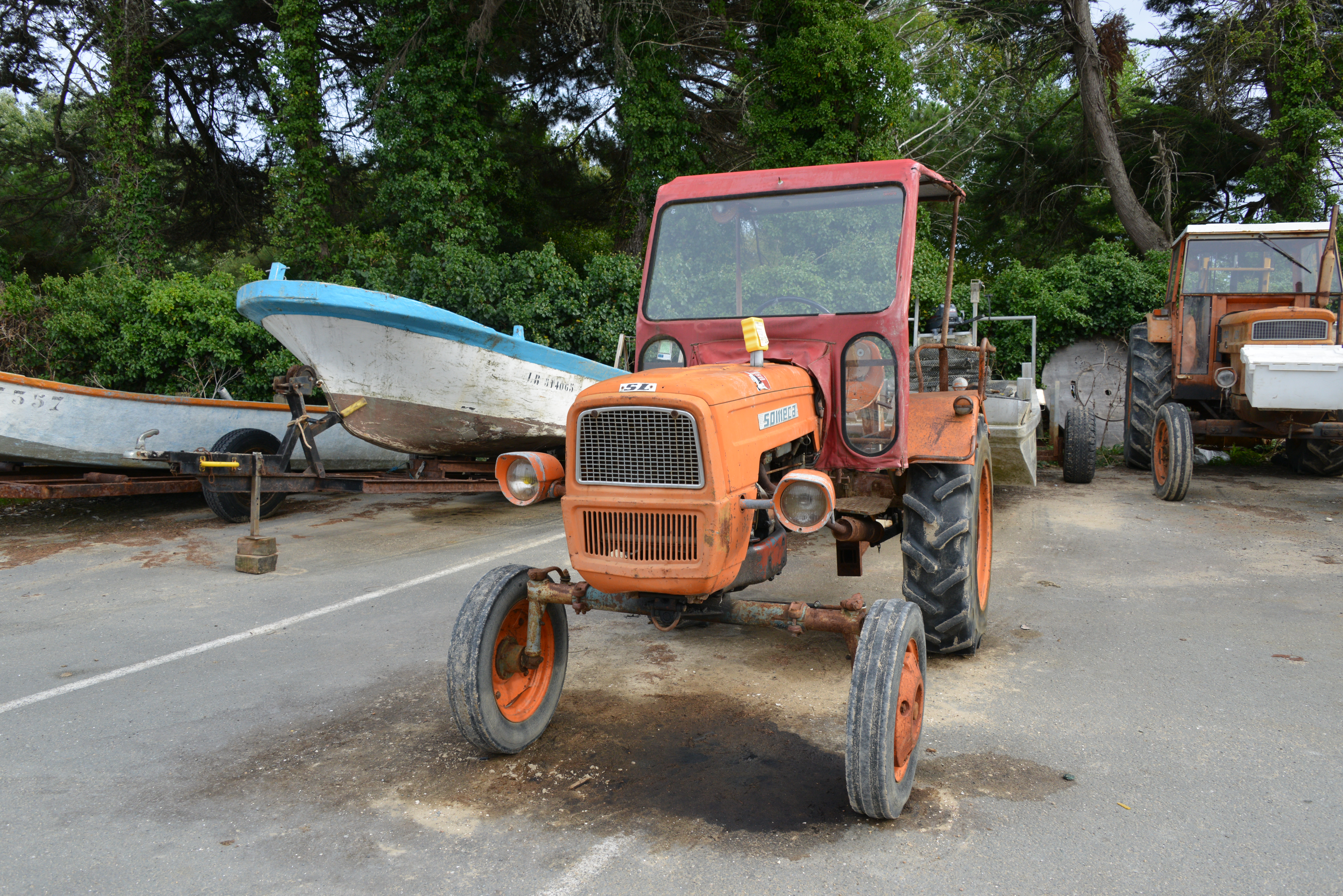 Un tracteur agricole Someca 215 (SL) utilisé pour tracter une remorque à chaland ostréicole. Ce tracteur est rouillé car il est laissé dehors et attaqué par l’eau de mer. Les Portes-en-Ré, parking de La Patache, Île de Ré, Charente-Maritime, France.